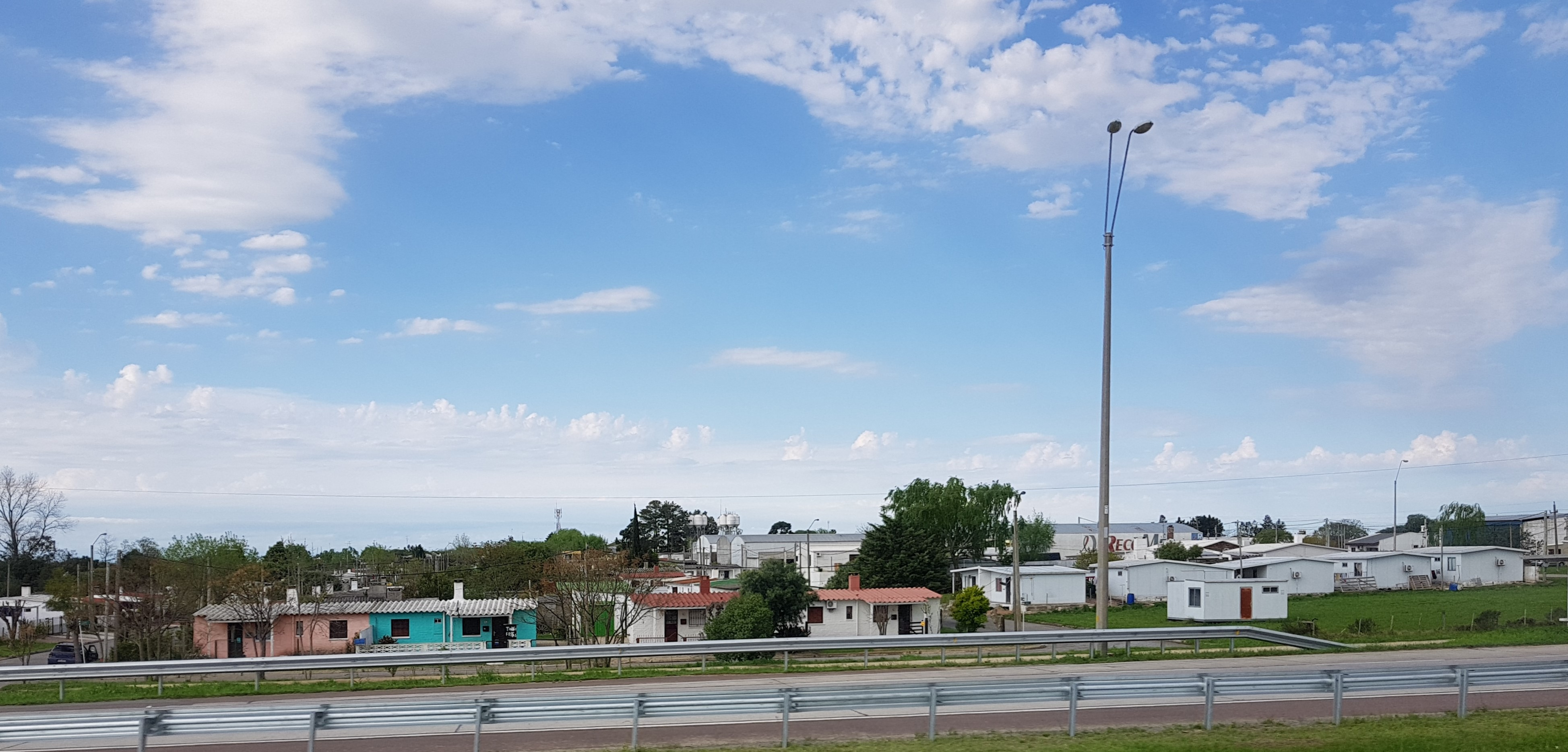 Vista parcial de la localidad de Puntas de Valdez desde la ruta 1 en setiembre de 2018